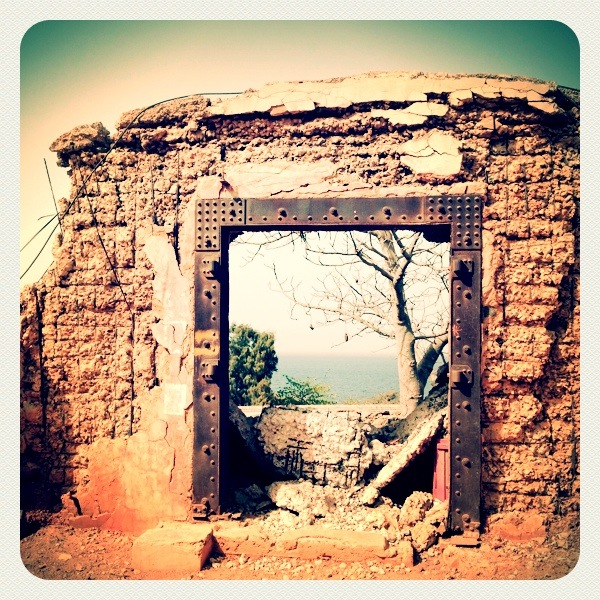 Île De Gorée, En allant vers le castel